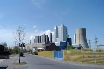 RWE Niederaußem